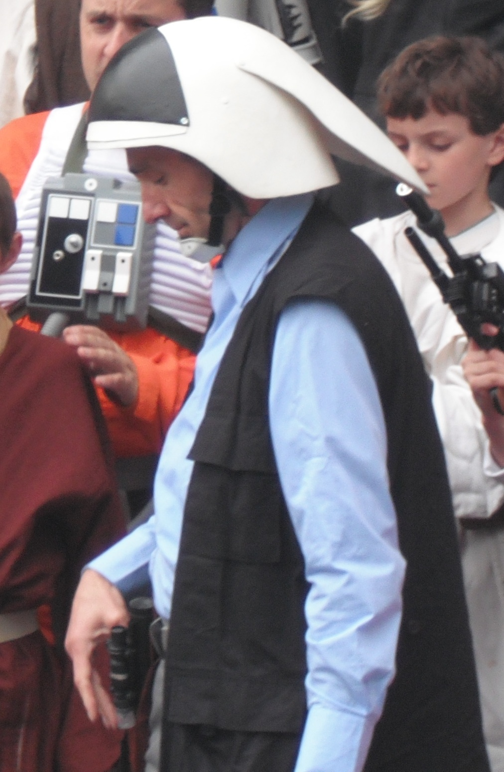 Cosplay de Soldat rebelle Cusset